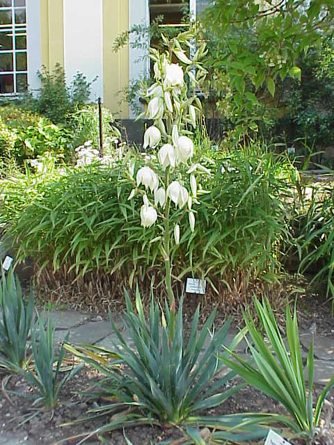 Species: Yucca filamentosa Family: Liliaceae Image No. 2